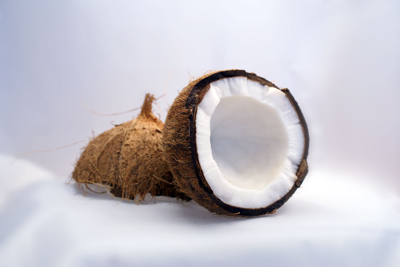 Kokusnuss, in Hälften gebrochen; Coconut, broken into halves